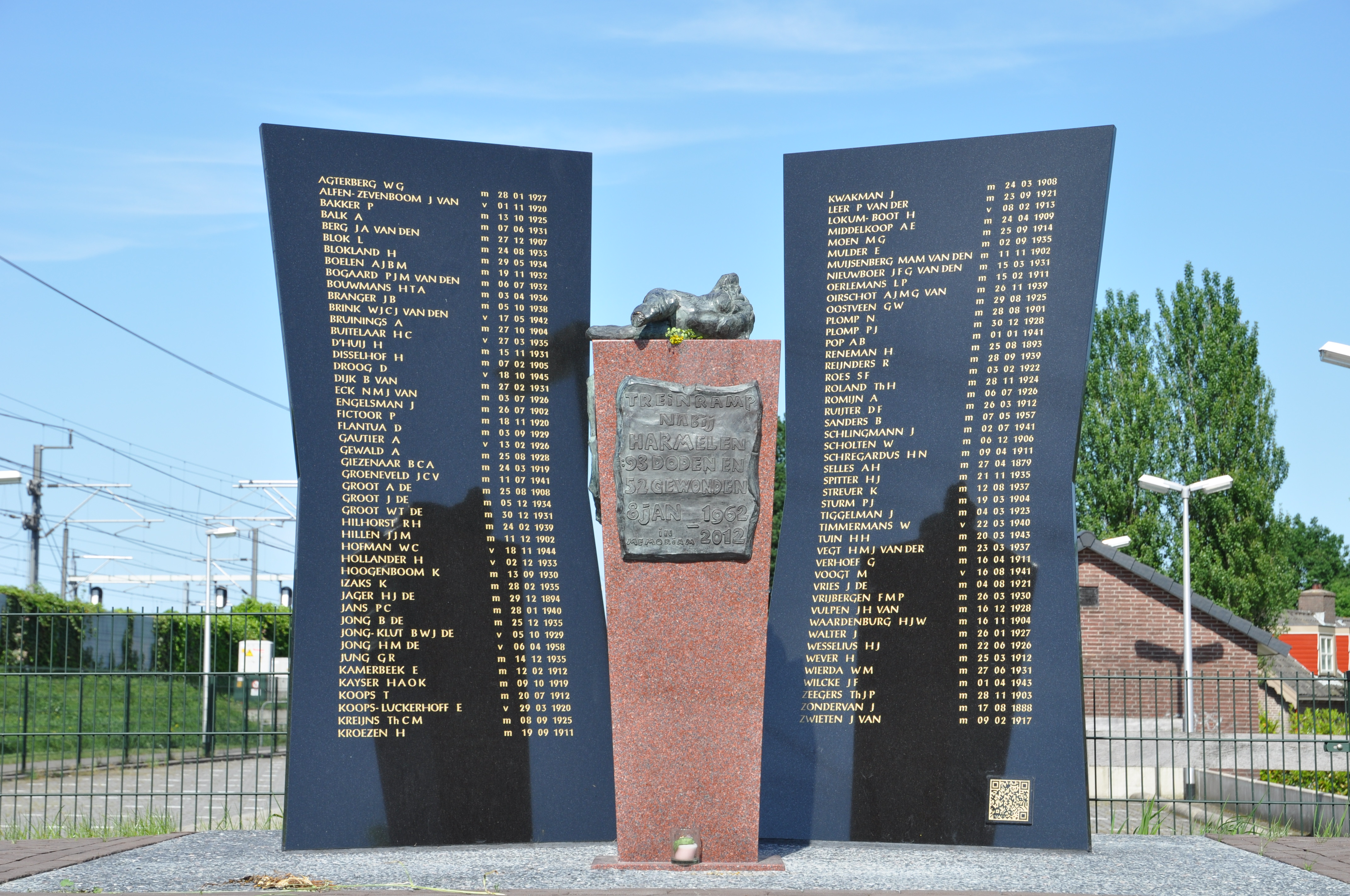 Monument voor de slachtoffers van de treinramp nabij Harmelen, onthuld op 8 januari 2012 door Pieter van Vollenhoven, exact 50 jaar na de ramp. Monument is ontworpen door Taeke de Jong. Van de betreffende Wikipediapagina: "Het ontwerp bestaat uit twee hardstenen platen die scheef ten opzichte van elkaar staan en waarop de 93 namen van de slachtoffers staan. Tussen de platen door is de plek des onheils te zien. Tussen de platen staat een sokkel in rode hardsteen, met daarop een corpus dat de slachtoffers verbeeldt." Het monument staat permanent aan de openbare weg en is gefotografeerd zoals het zich aldaar bevindt.